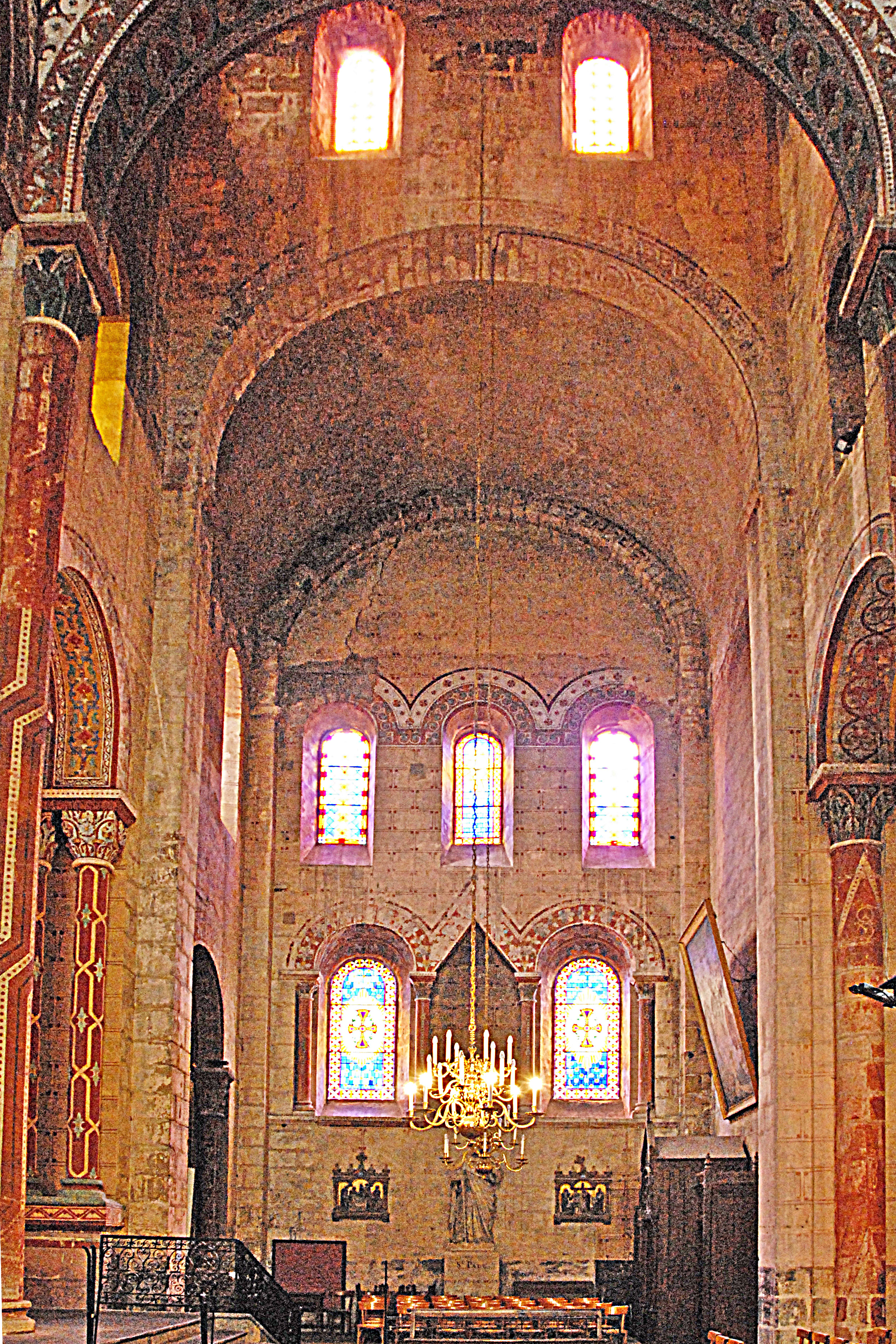 südl. Querhausarm